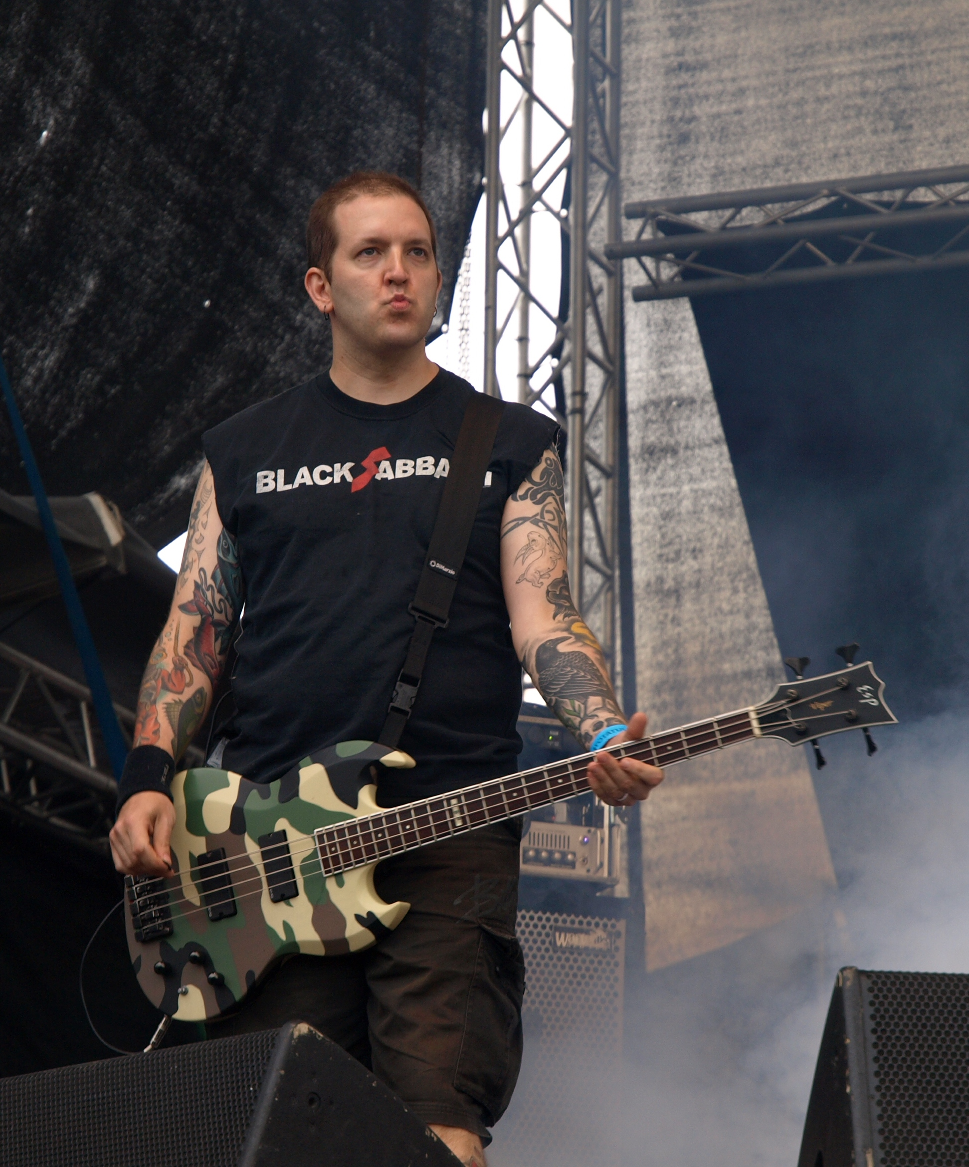 Rytmihäiriö live am Myötätuulirock 2011